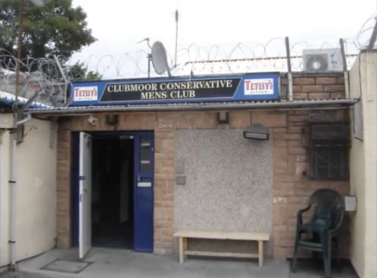 Clubmoor Club. Es considerado el lugar en el que debutó Paul McCartney con The Quarrymen en noviembre de 1957.